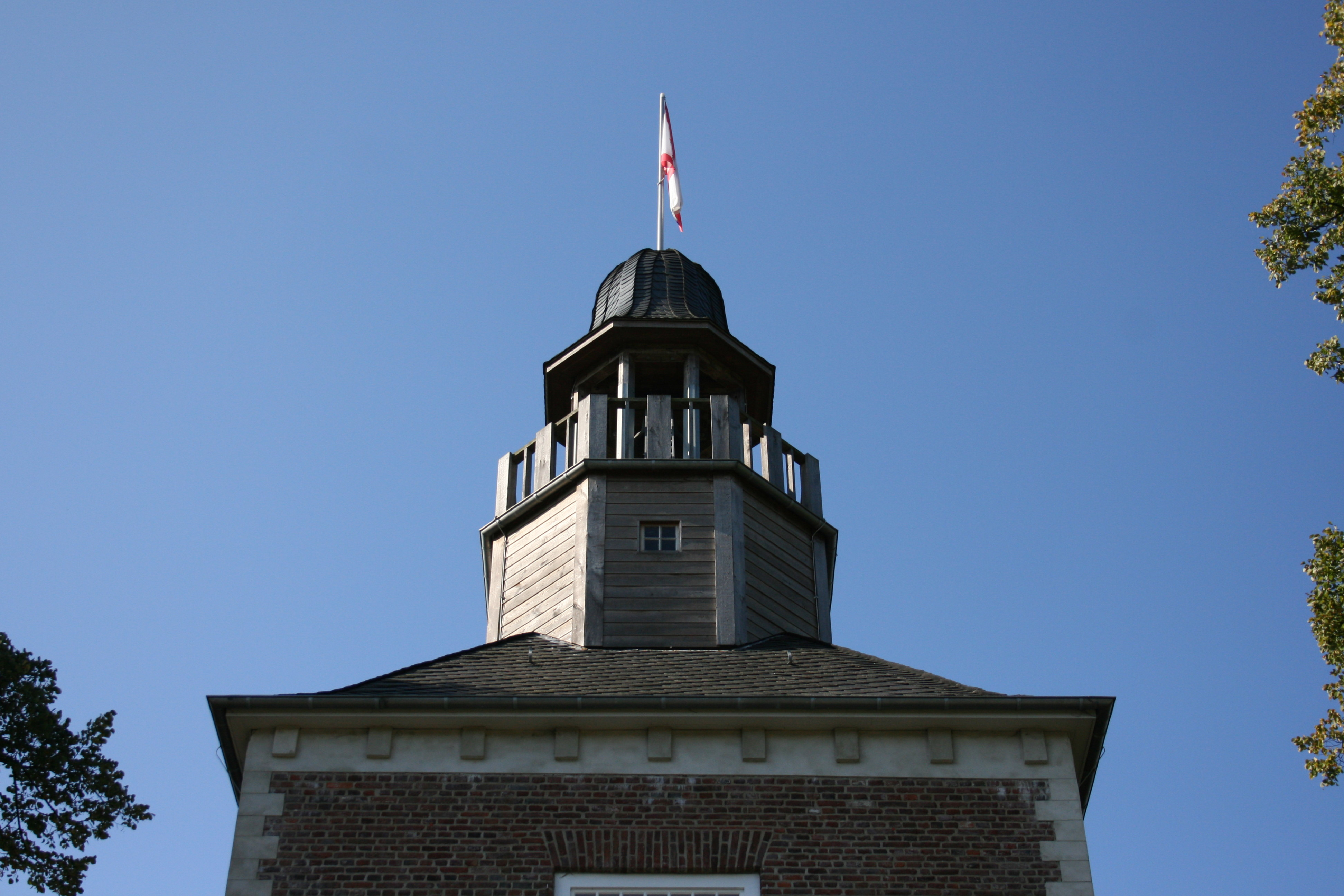 Haus Hertefeld in Weeze